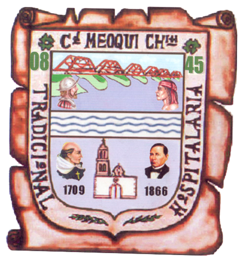 Escudo del Municipio de Meoqui, Chih., México